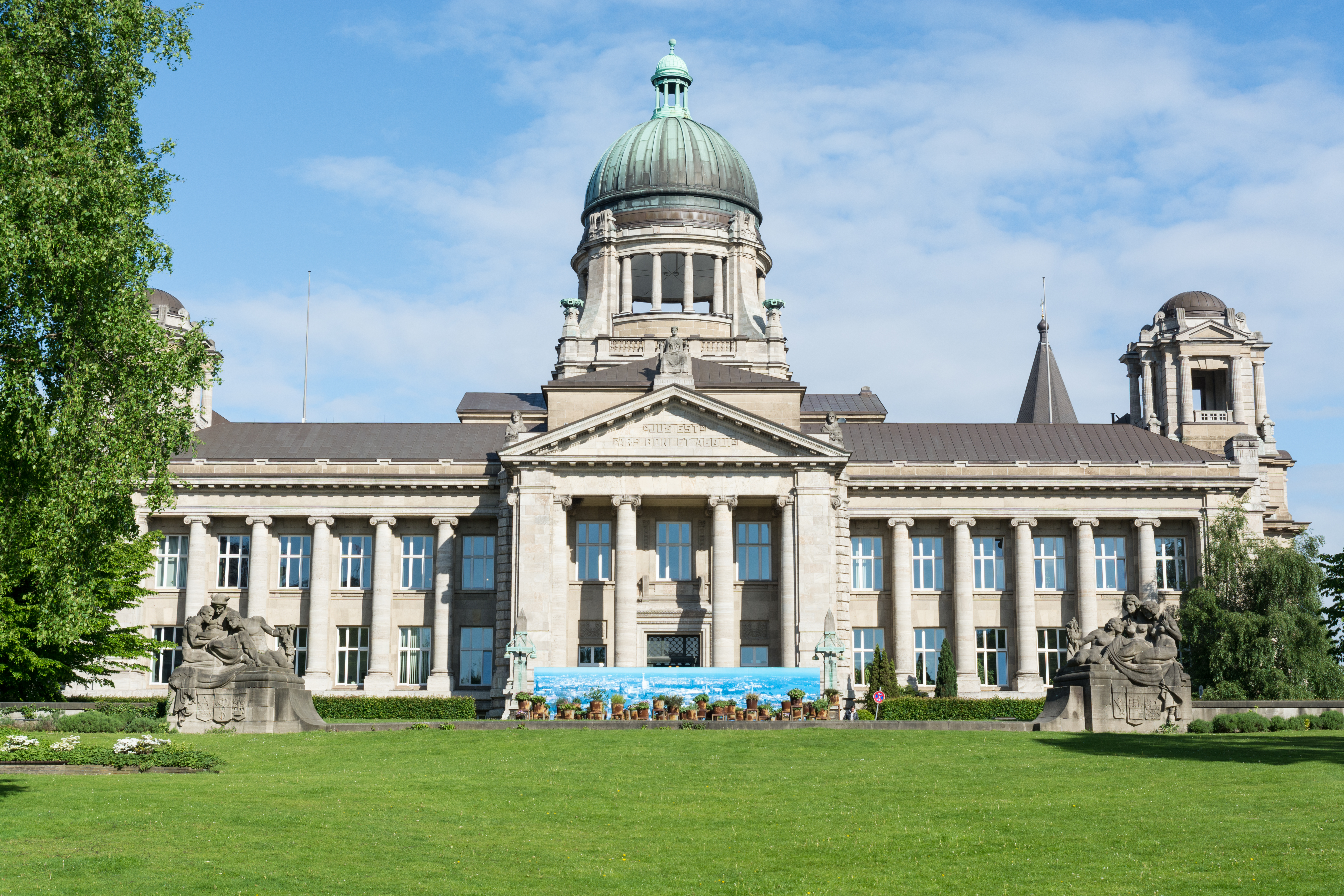 Hanseatisches Oberlandesgericht in Hamburg-Neustadt. This is a photograph of an architectural monument.